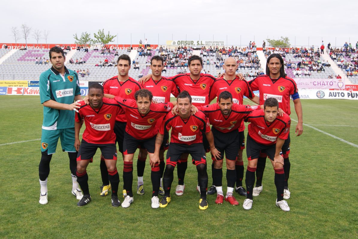 Alineación del CF Atlético Ciudad durante la temporada 2009-10, la última de su existencia. Formada por Falcón (portero), Óscar, Aloisio, Felix Prieto, Palencia, Expósito, Meca, Santi Villa, Danilson, Alex y Ragel.